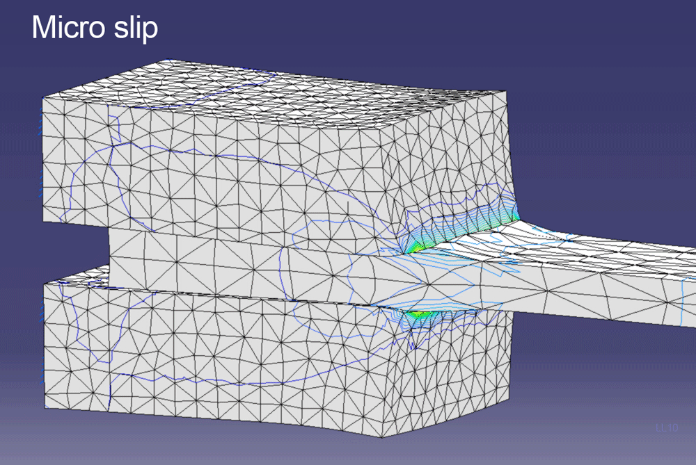 Micro slip FEM calculation.